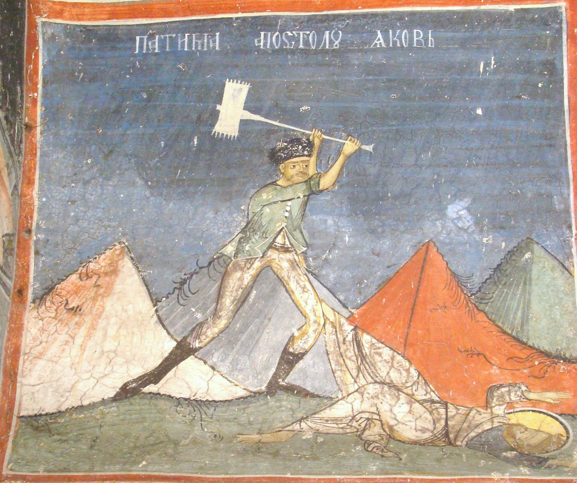 Ansamblul bisericii "Sf. Ioan Botezătorul"